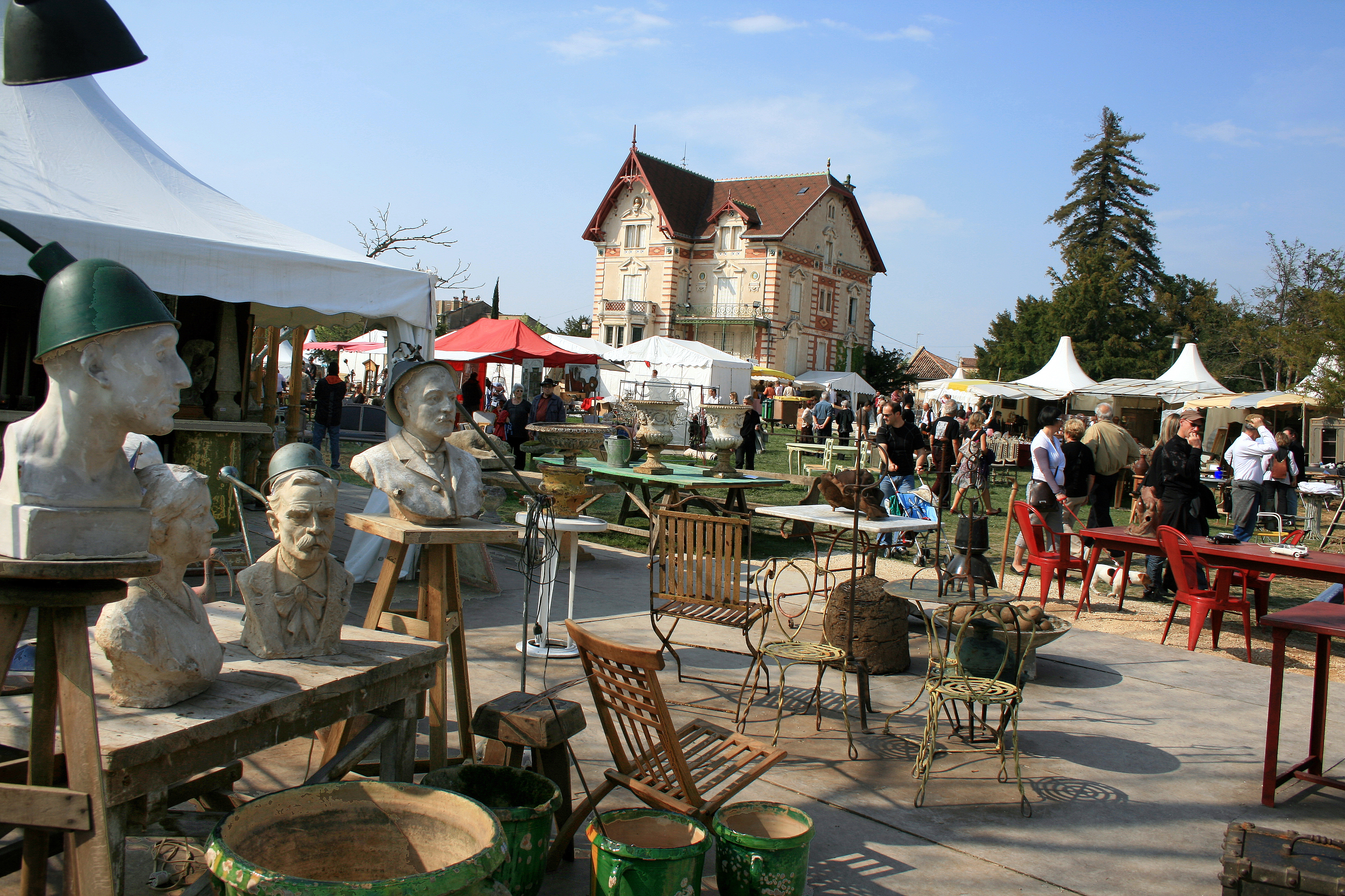 Vue du marché à l'Isle-sur-la-Sorgue